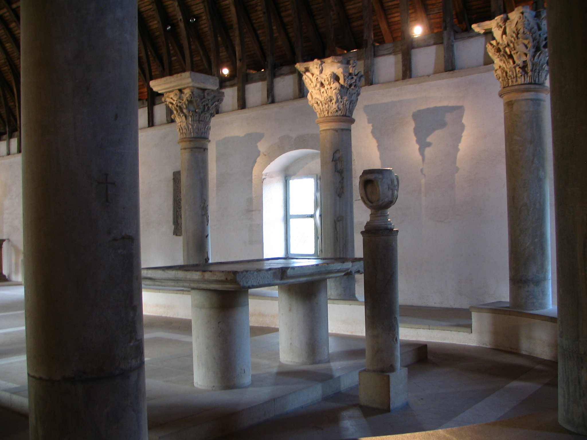 Autel à Cluny; reconstructed altar in Cluny